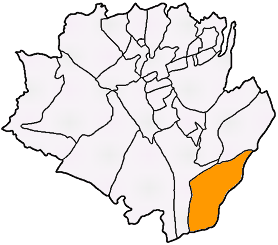 大平里在龍潭區 (台灣)中的位置。